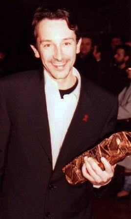 Jean-Hugues Anglade à la cérémonie des Césars, avec son prix du Meilleur acteur dans un second rôle pour le film La Reine Margot.